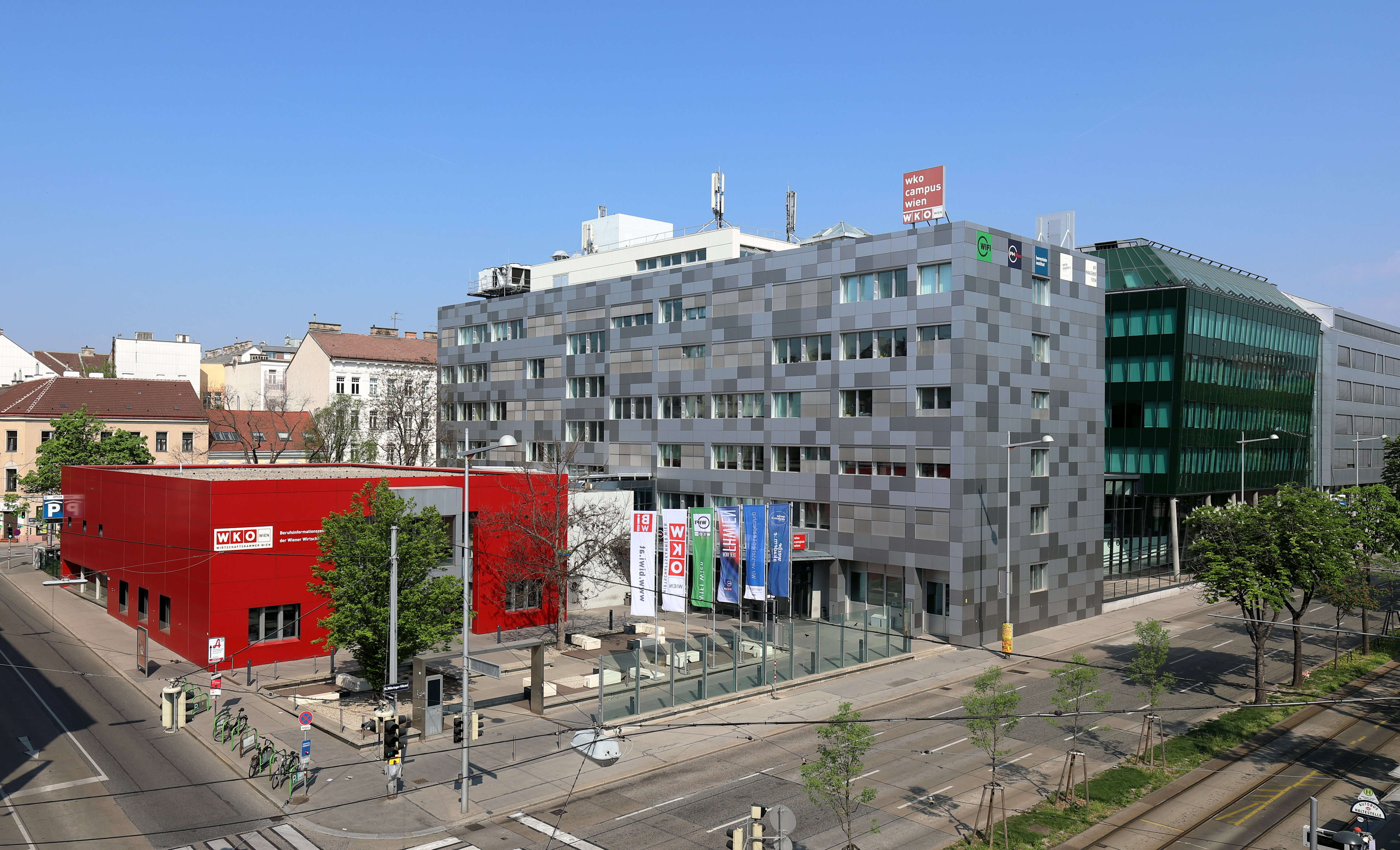 Der WKO-Campus-Wien am Währinger Gürtel im 18. Wiener Bezirk Währing.Der WKO-Campus-Wien beherbergt das WIFI, die FHWien, die Werbe Akademie und das Berufsinformationszentrum der Wiener Wirtschaft. Das WKO-Campus-Wien-Hauptgebäude (Bauteil B, grünes Gebäude) wurde nach Plänen des Architektenbüros Hoppe ZT durch die STRABAG errichtet und 2007 eröffnet. Der Um- und Ausbau des Areals kostete 27,4 Millionen Euro und bietet Raum für 2400 Studenten. 2010 erfolgte vom gleichen Architektenbüro der Um- oder Neubau des dahinterliegenden Gebäudes (Bauteil C, nur teilweise sichtbar).